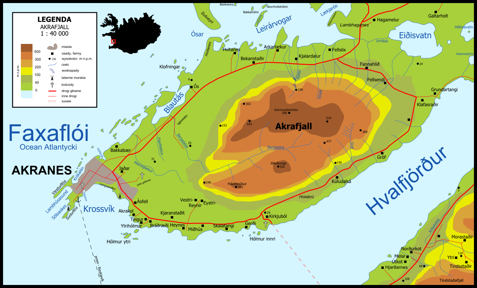 Akrafjall